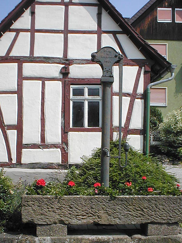 Historischer Brunnen vor historischem Fachwerkschuppen in Hüffenhardt // Historic fountain in front of historic framework shed at Hüffenhardt, germany